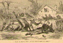 Illustration d'Horace Castelli pour Diloy le chemineau de la comtesse de Ségur (1868), Bibliothèque rose. Diloy sauve le colonel d'Alban.